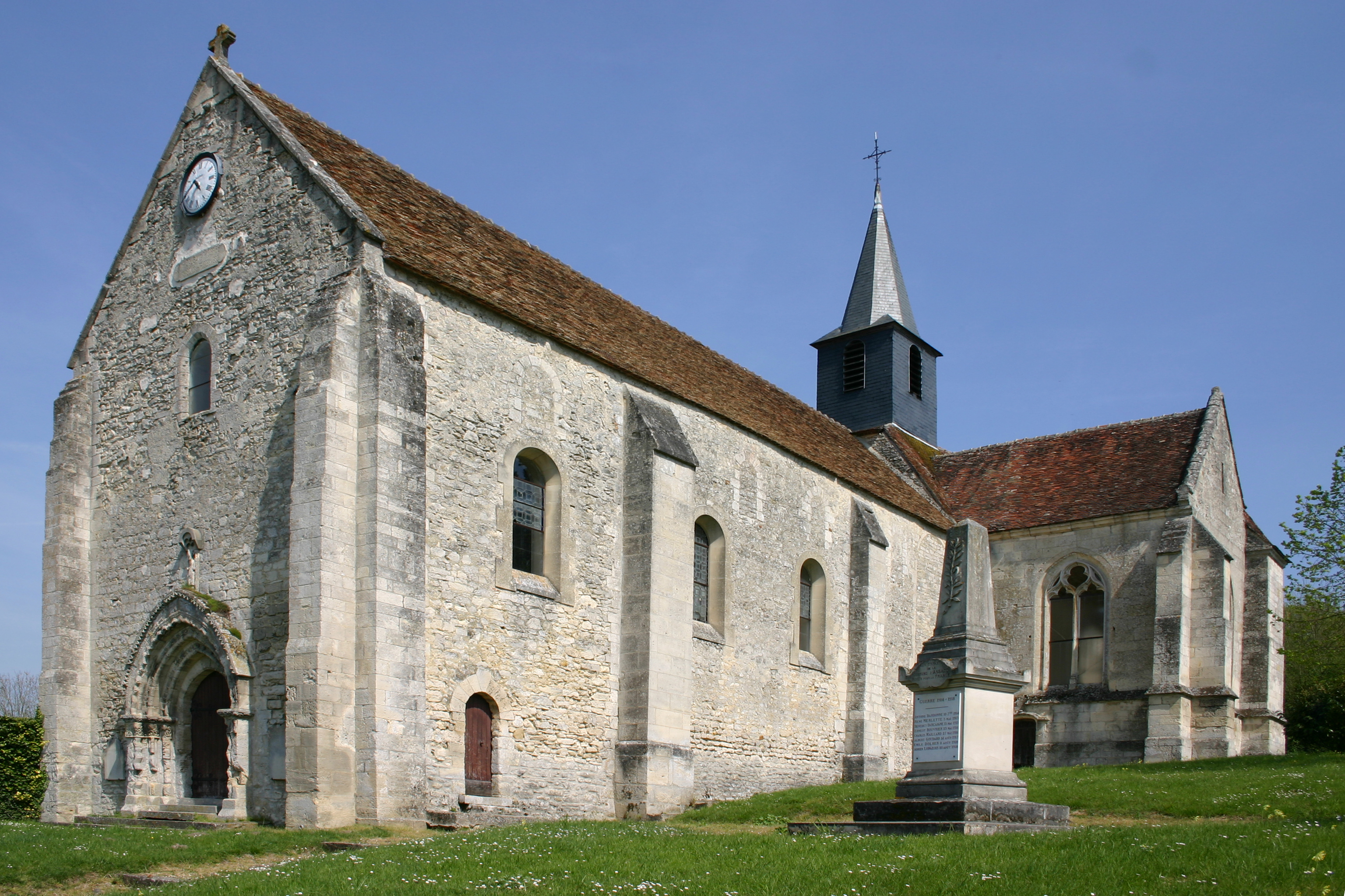 église d'Ansacq datant du XIIe siècle